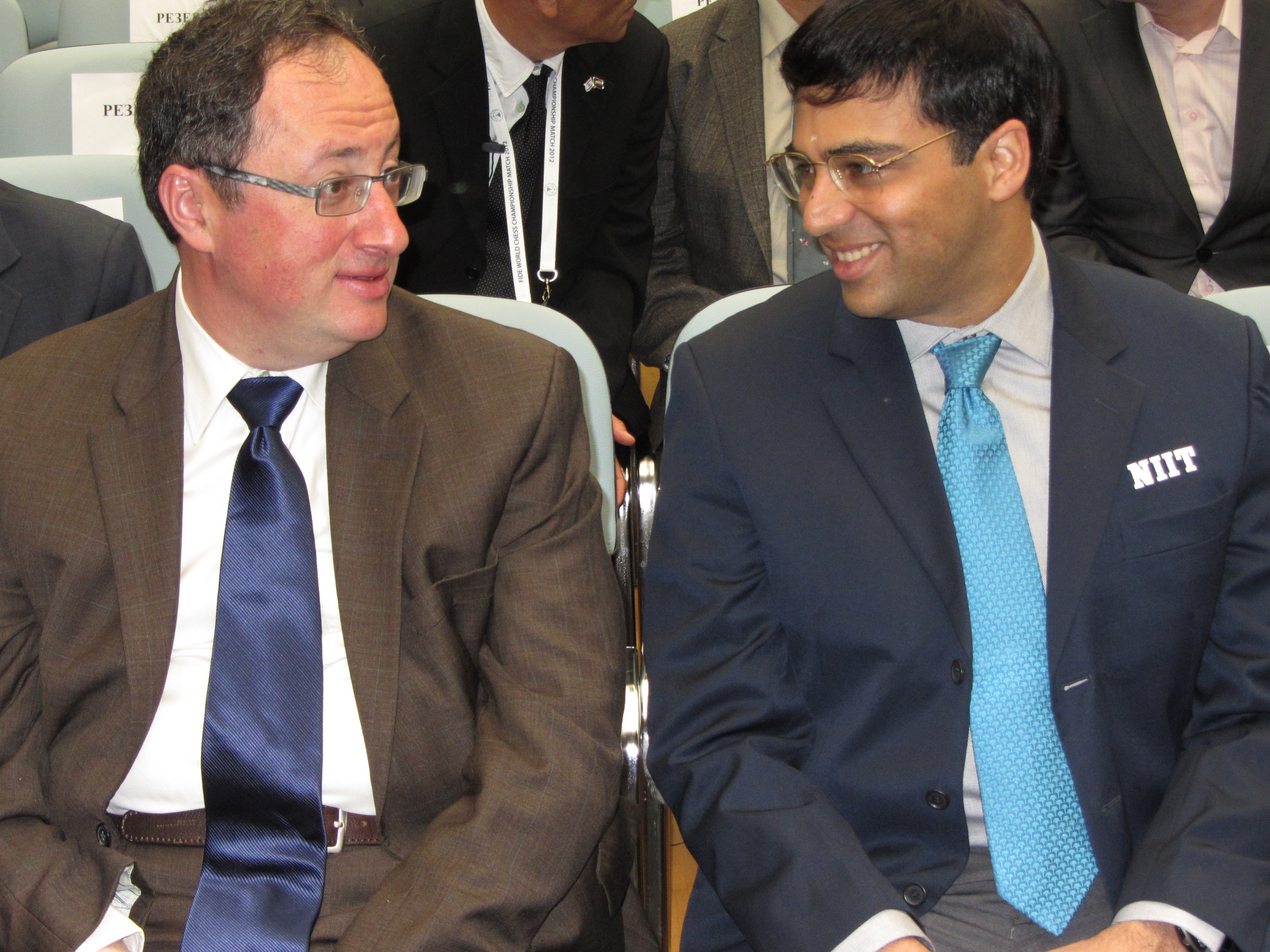 Borís Gélfand y Vishy Anand durante el Campeonato Mundial 2012